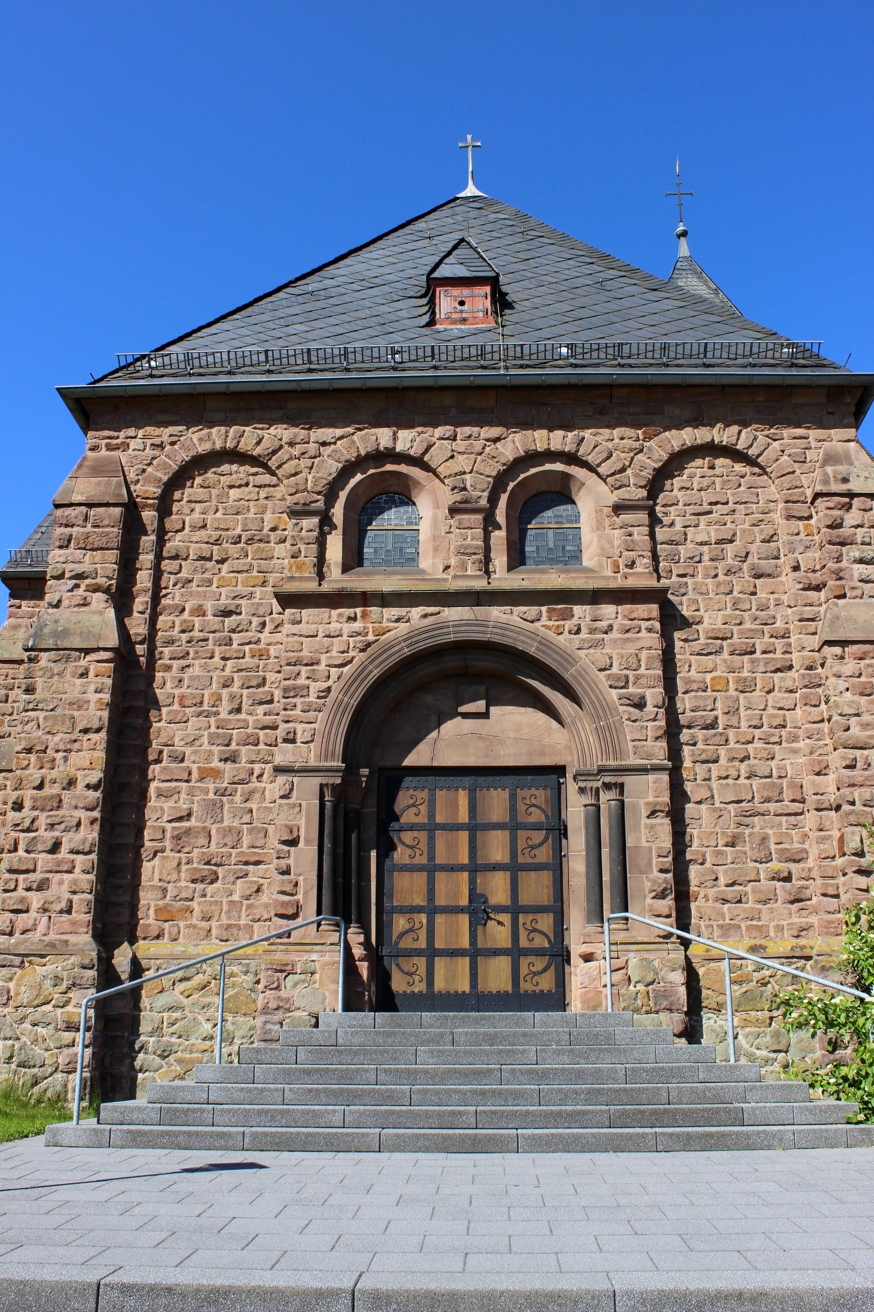 Portal der katholischen Filialkirche St. Antonius von Padua in Niedersaubach, einem Stadtteil von Lebach, Landkreis Saarlouis, Saarland